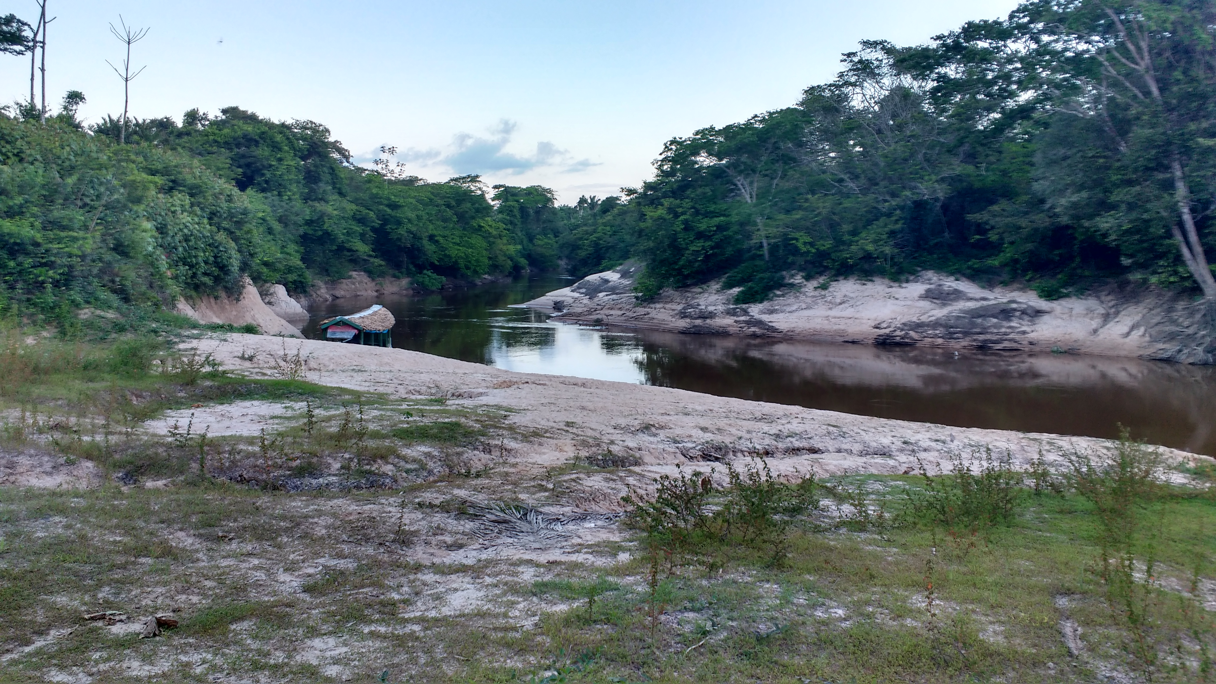 Uma bela imagem do rio Carú